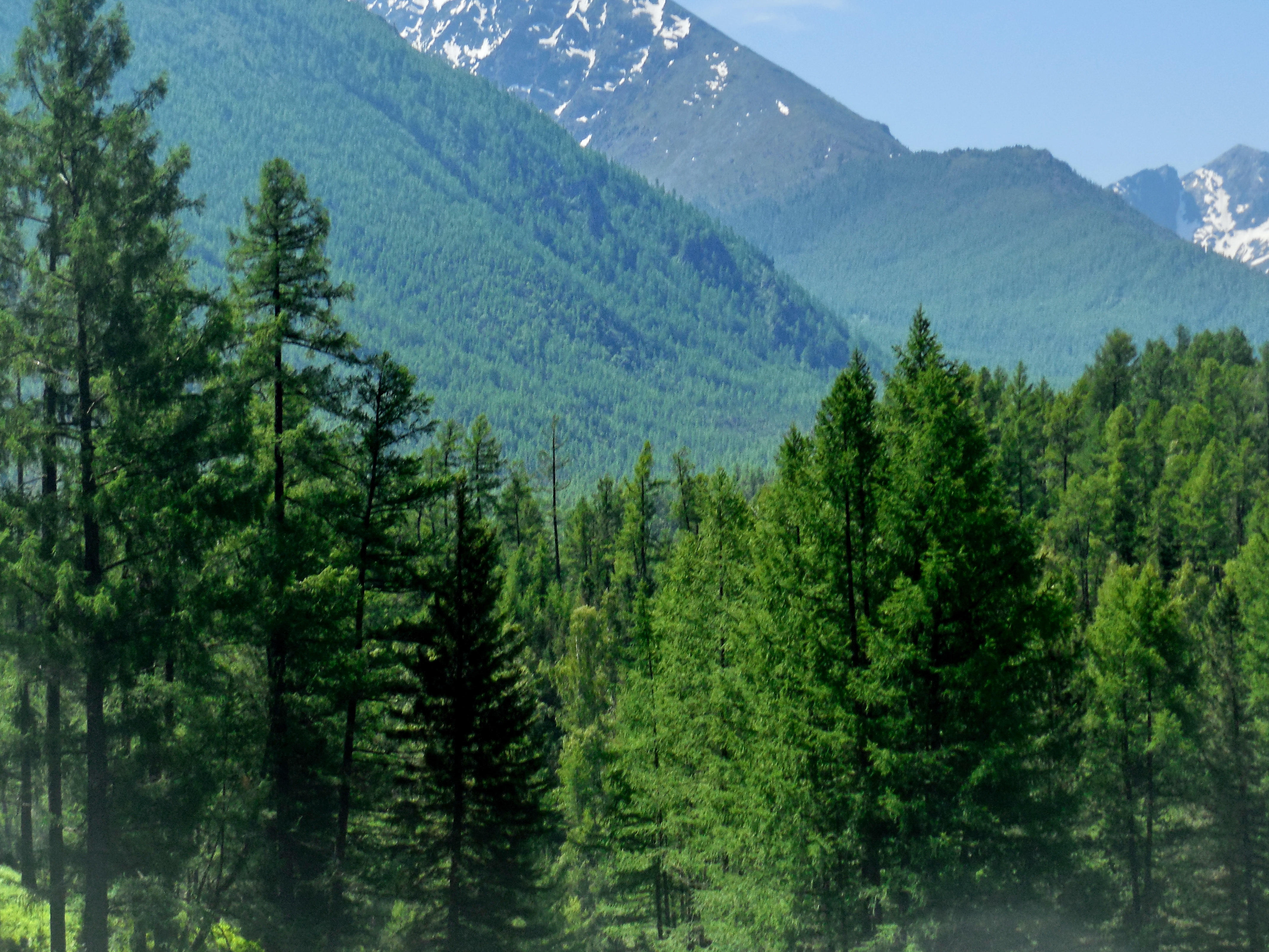 Горный Алтай